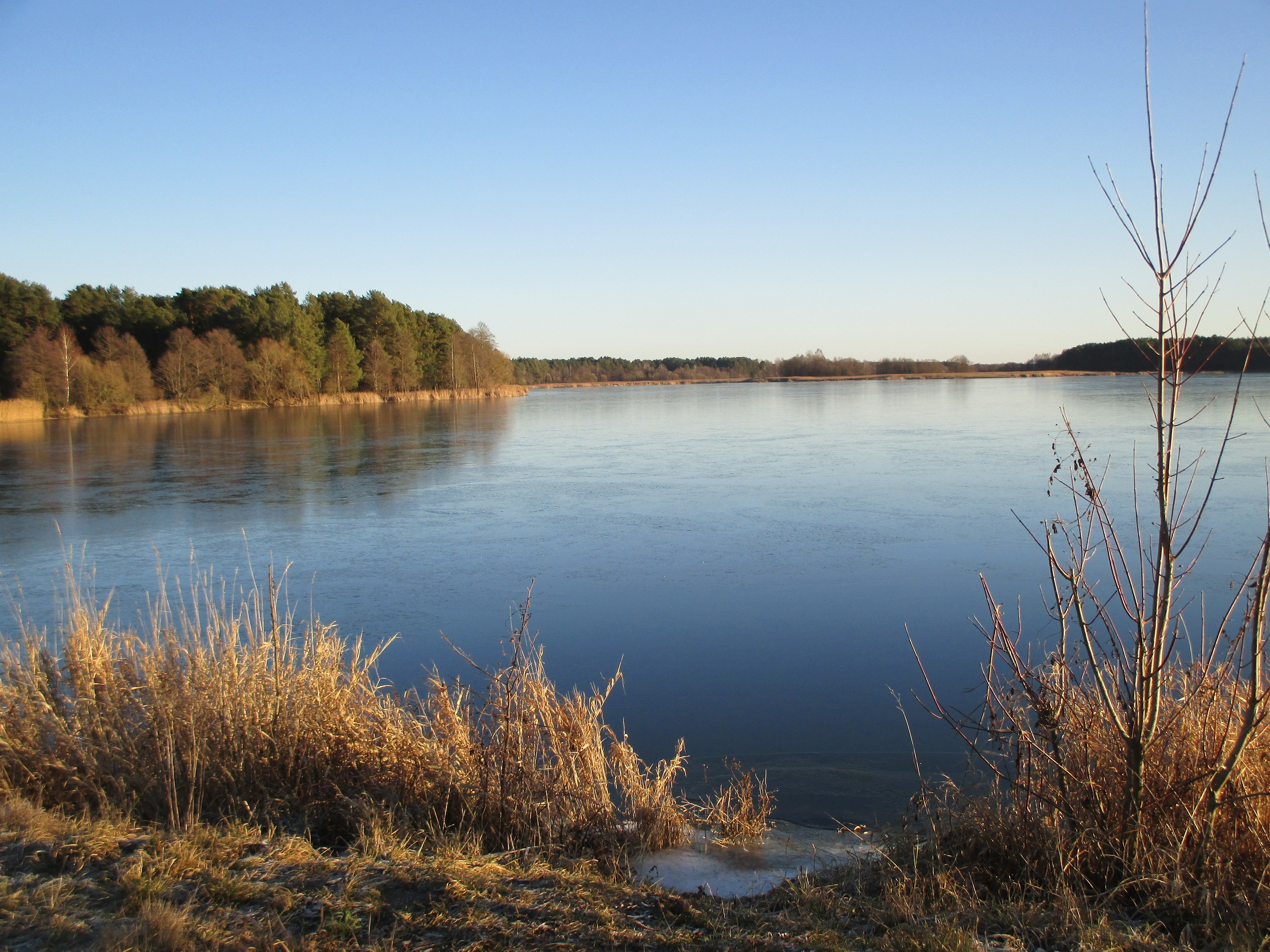 Гезгальскае вадасховішча, першы лёд